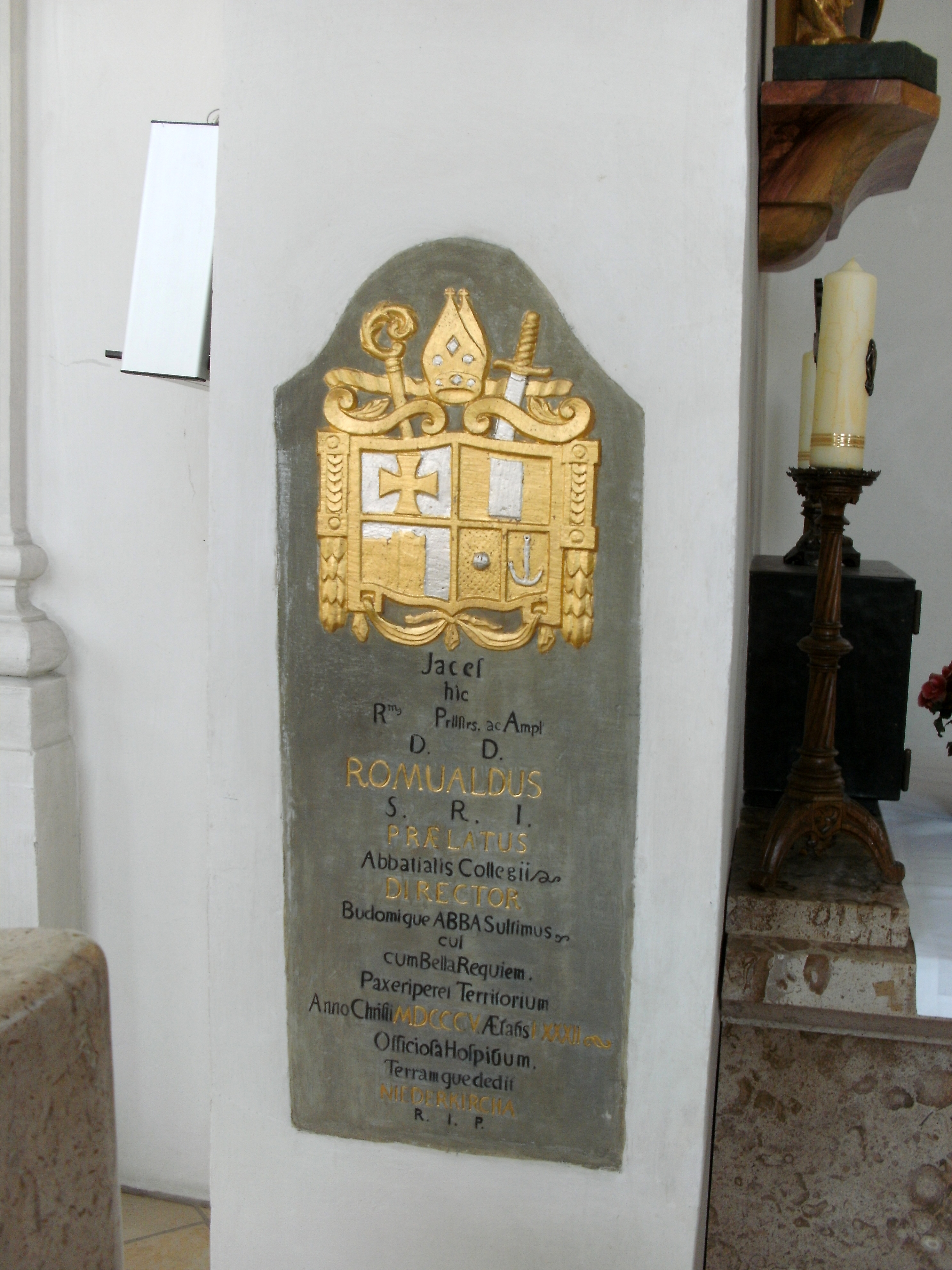 Romuald Weltin 26. Reichsabt der Benediktinerreichsabtei Ochsenhausen sein Epitaph in der Niederkirch in Untersulmetingen (Laupheim)